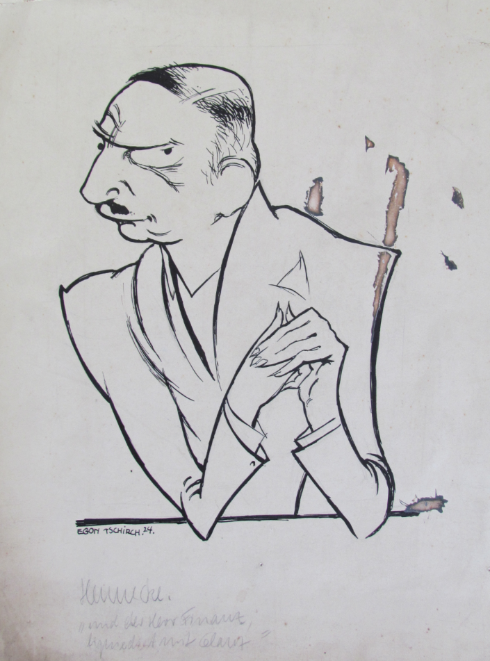 Egon Tschirch: Hans Hennecke, Finanzminister Mecklenburg-Schwerin (1924)